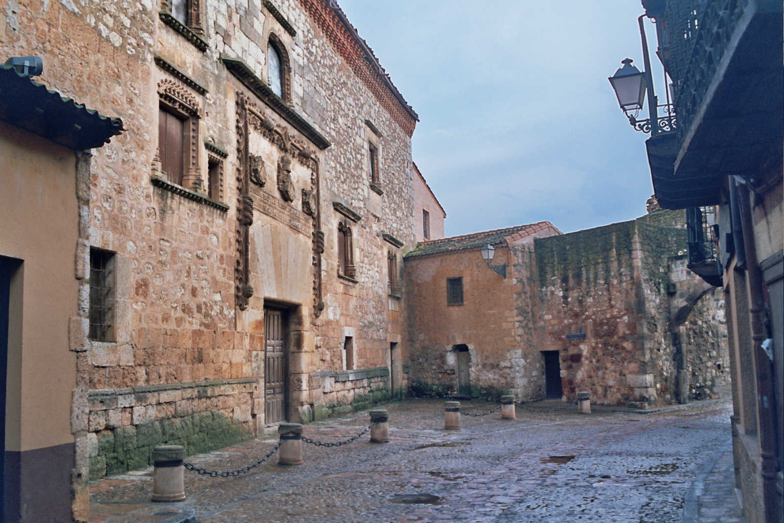 Segovia. (Castilla-León. España) Ayllón. Palacio de Contreras. Fotografía realizada el 25 agosto de 2002 por el autor. User:Pelayo2